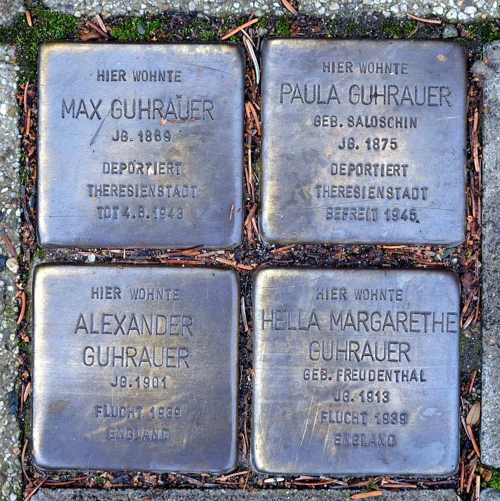 Braunschweig: Stolpersteine für vier Mitglieder der Familie Guhrauer vor dem ehemaligen Judenhaus Hennebergstraße 7, in dem sie zuletzt leben mussten.